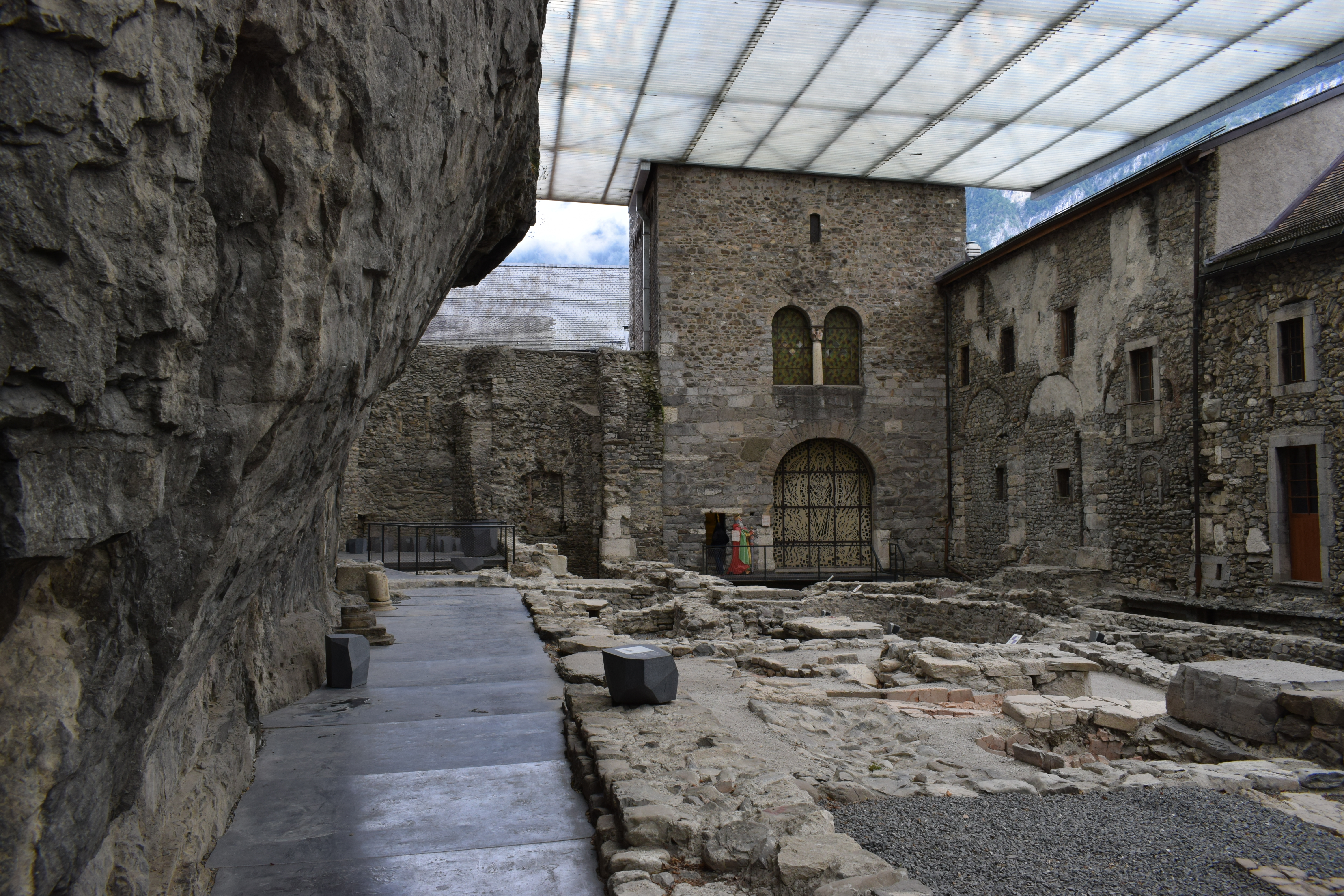 Vue de l'abbaye de Saint-Maurice, dans le canton du Valais (Suisse).